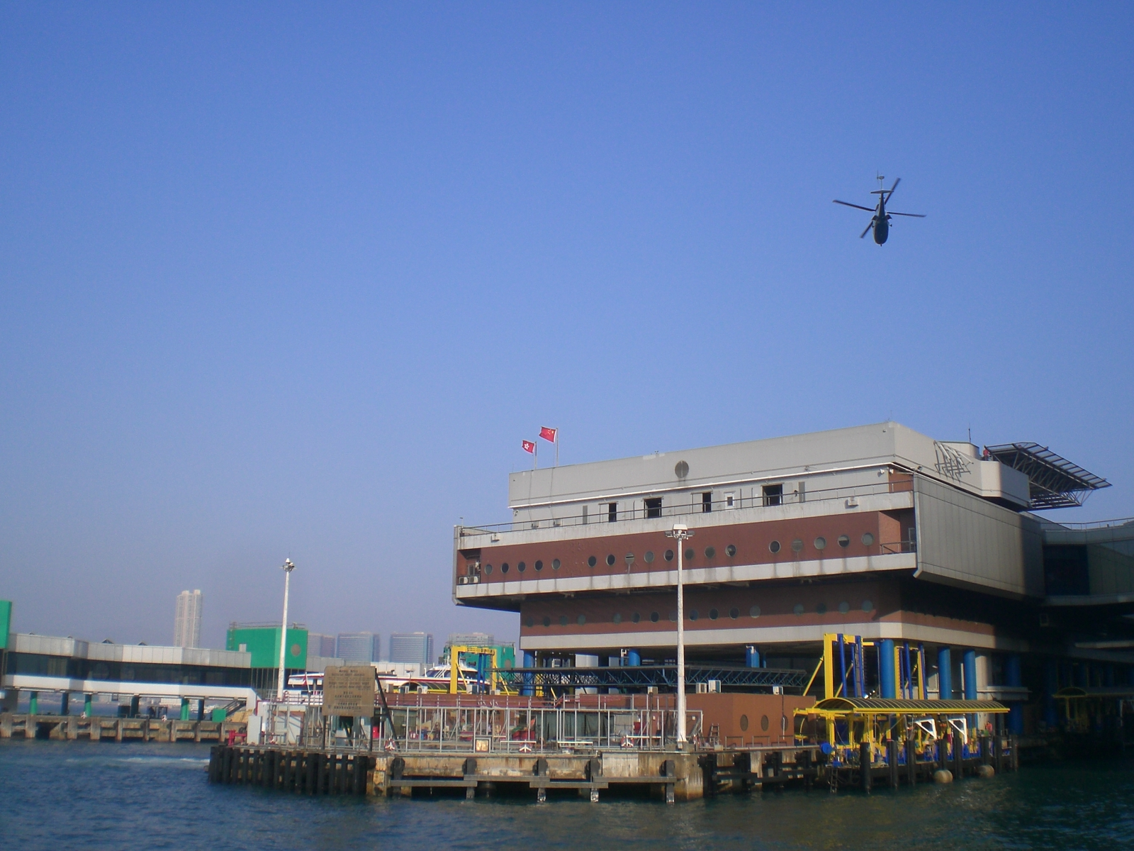 信德中心香港港澳碼頭直升機飛機場 Hong Kong-Macau Ferry Terminal Heliport, Hong Kong-Macau Ferry Pier, Sheung Wan, Hong Kong.